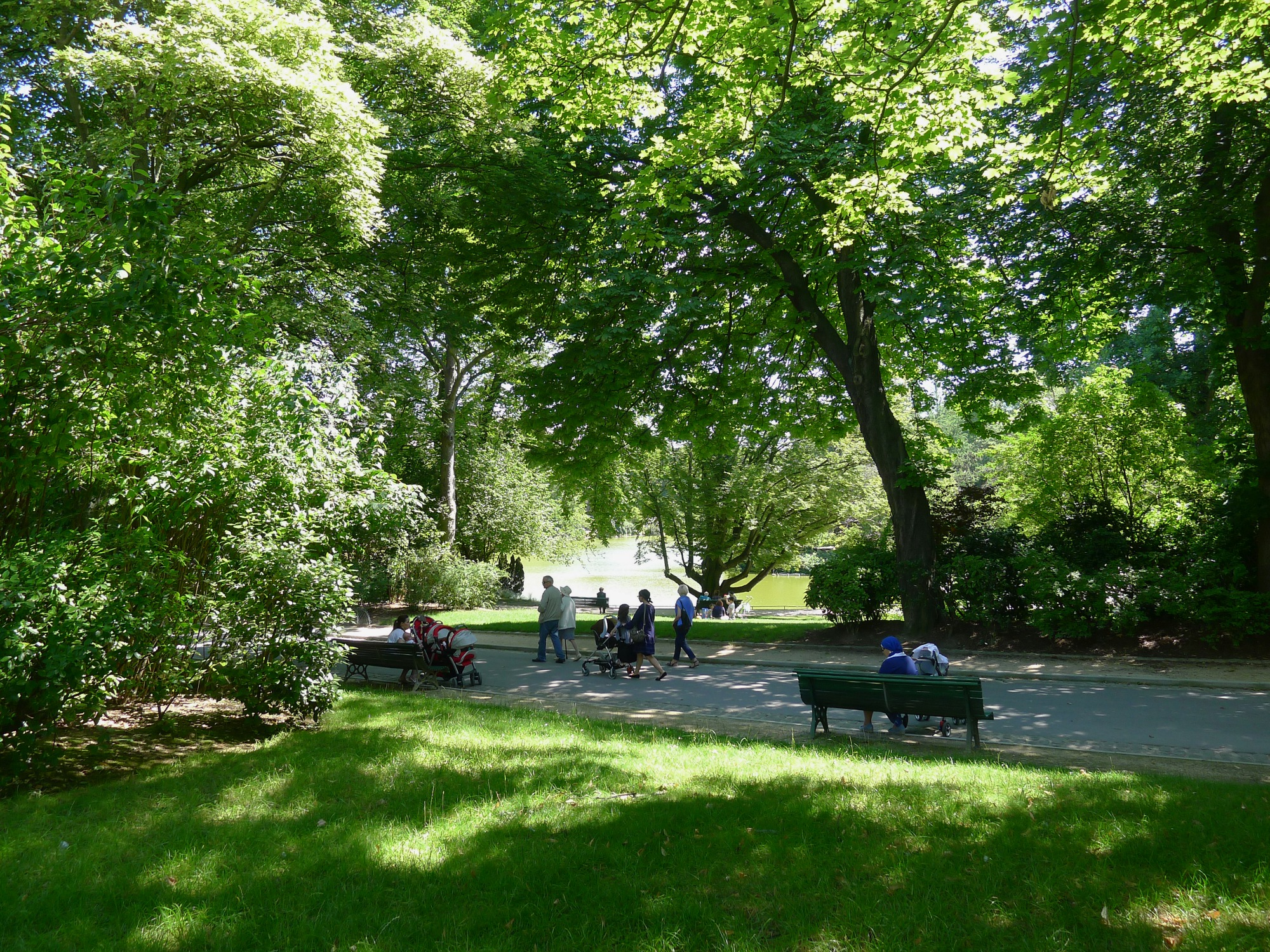 Parc Montsouris (allée de la Vanne) - Paris XIV